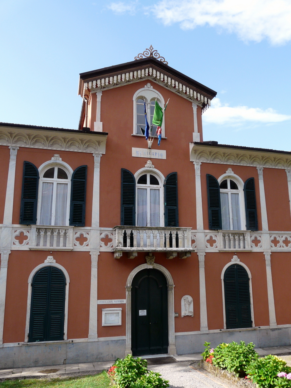 Municipio di Savignone, Liguria, Italia